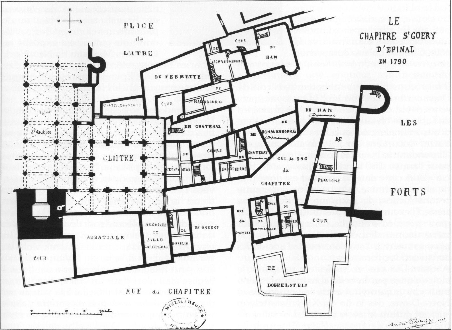 reconstitution, par A. Philippe, du chapitre de St-Goéry à épinal en l'état de 1790.